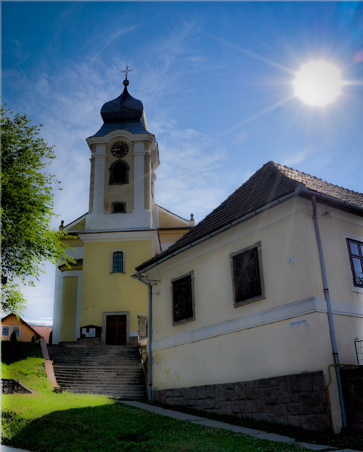 Szent Vid és 14 segítő szent Római katolikus templom (Pilisborosjenő, Templom tér) This is a photo of a monument in Hungary. Identifier: 7226